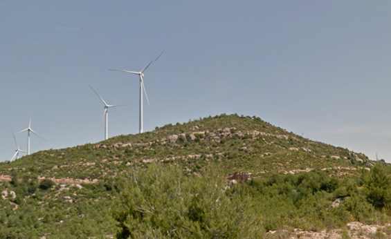 Fotografia de la Còpia de Palomes (837 m) des de la carretera BV-1031, el juny del 2013.